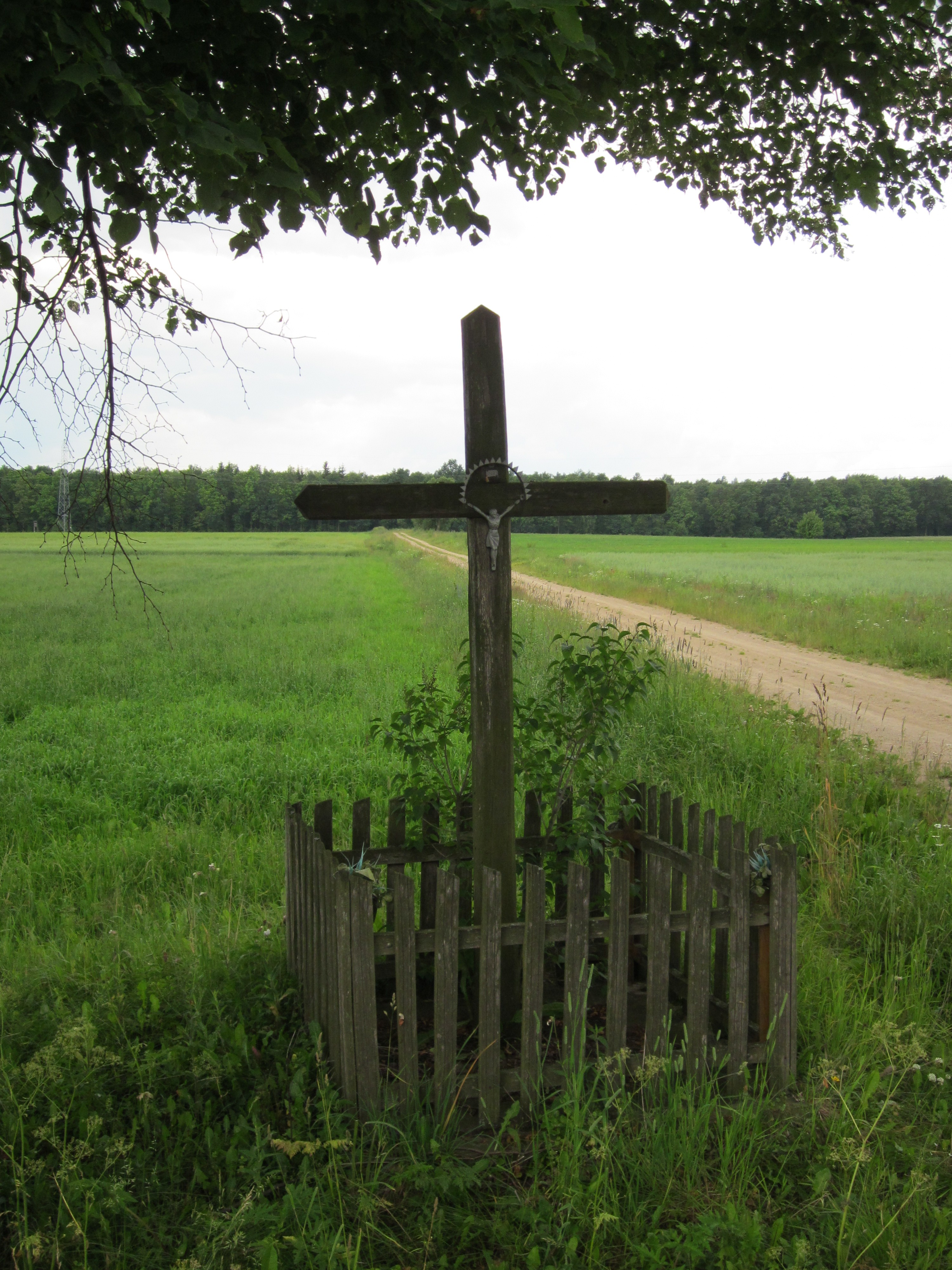 Krzyż ten znajduje się obecnie przy drodze powiatowej Średnica Pawłowięta – Dąbrówka Kościelna. Na wprost tego krzyża jest droga polna, która prowadziła do głównej siedziby majątku Gierałty Stare 134.